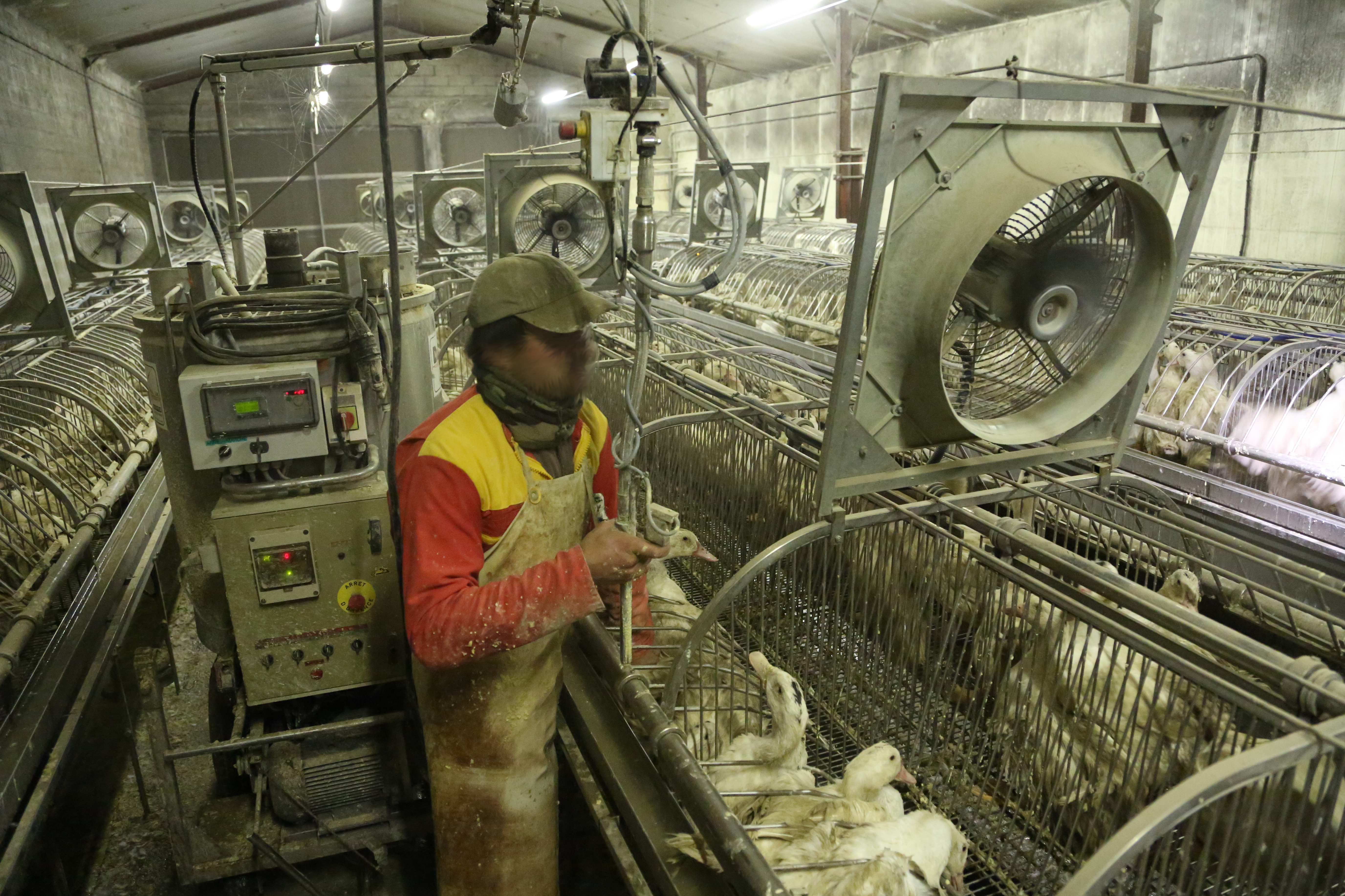 Gavage industriel des canards à foie gras en cages collectives, France 2012